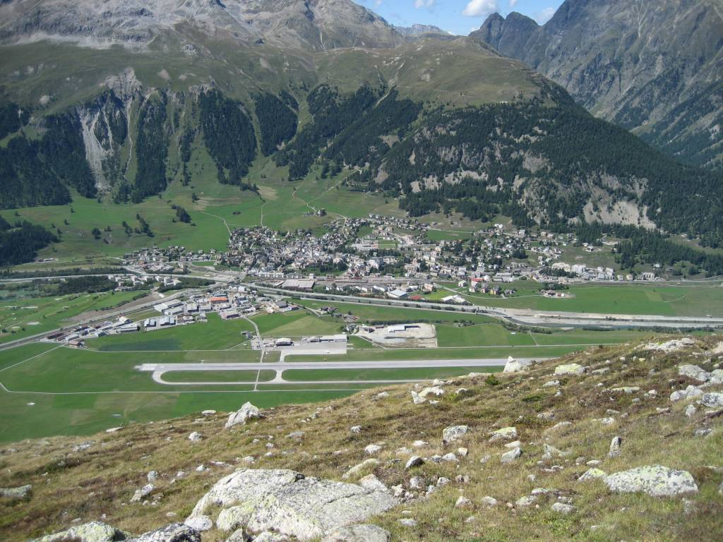 Blick auf Samedan